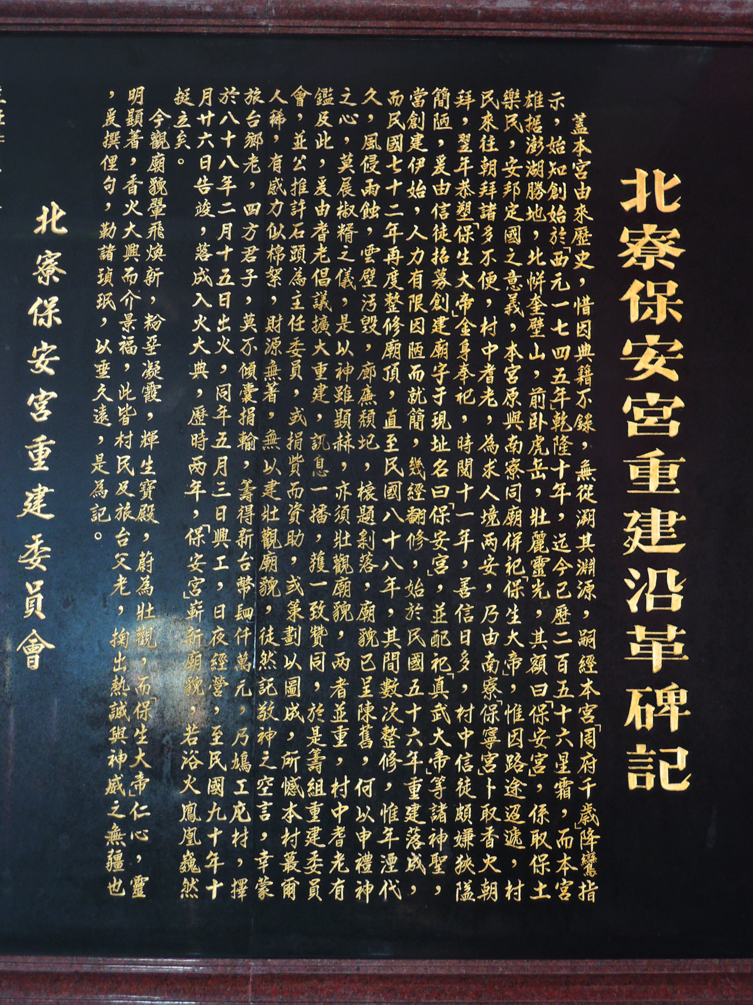 北寮保安宮，主祀保生大帝